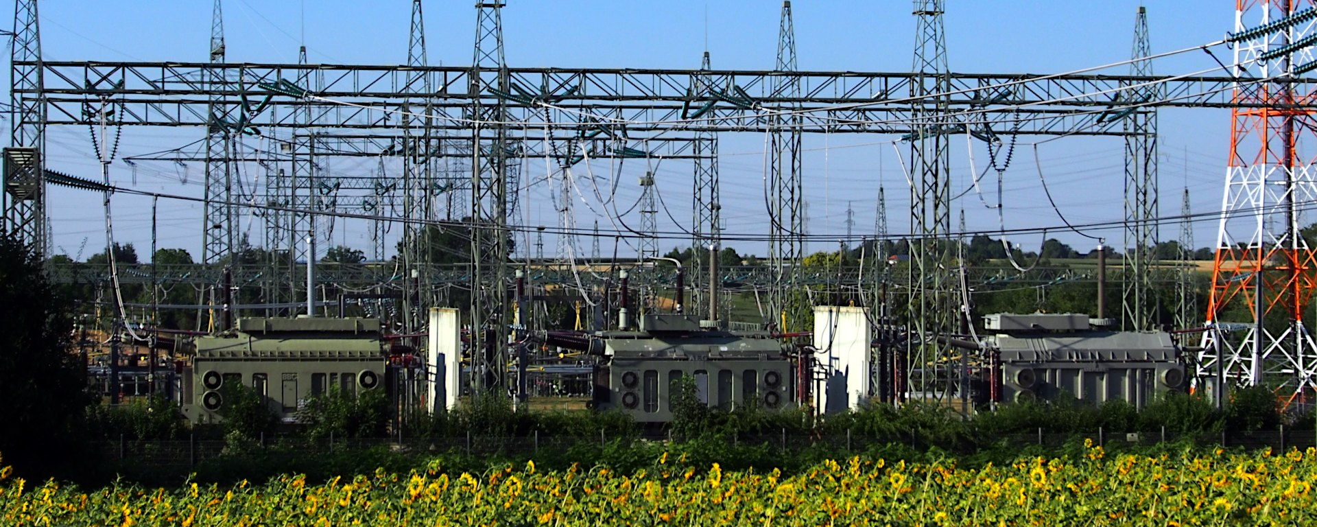 Netzkuppler aus drei einphasigen Transformatoren von BBC, AEG und Siemens.